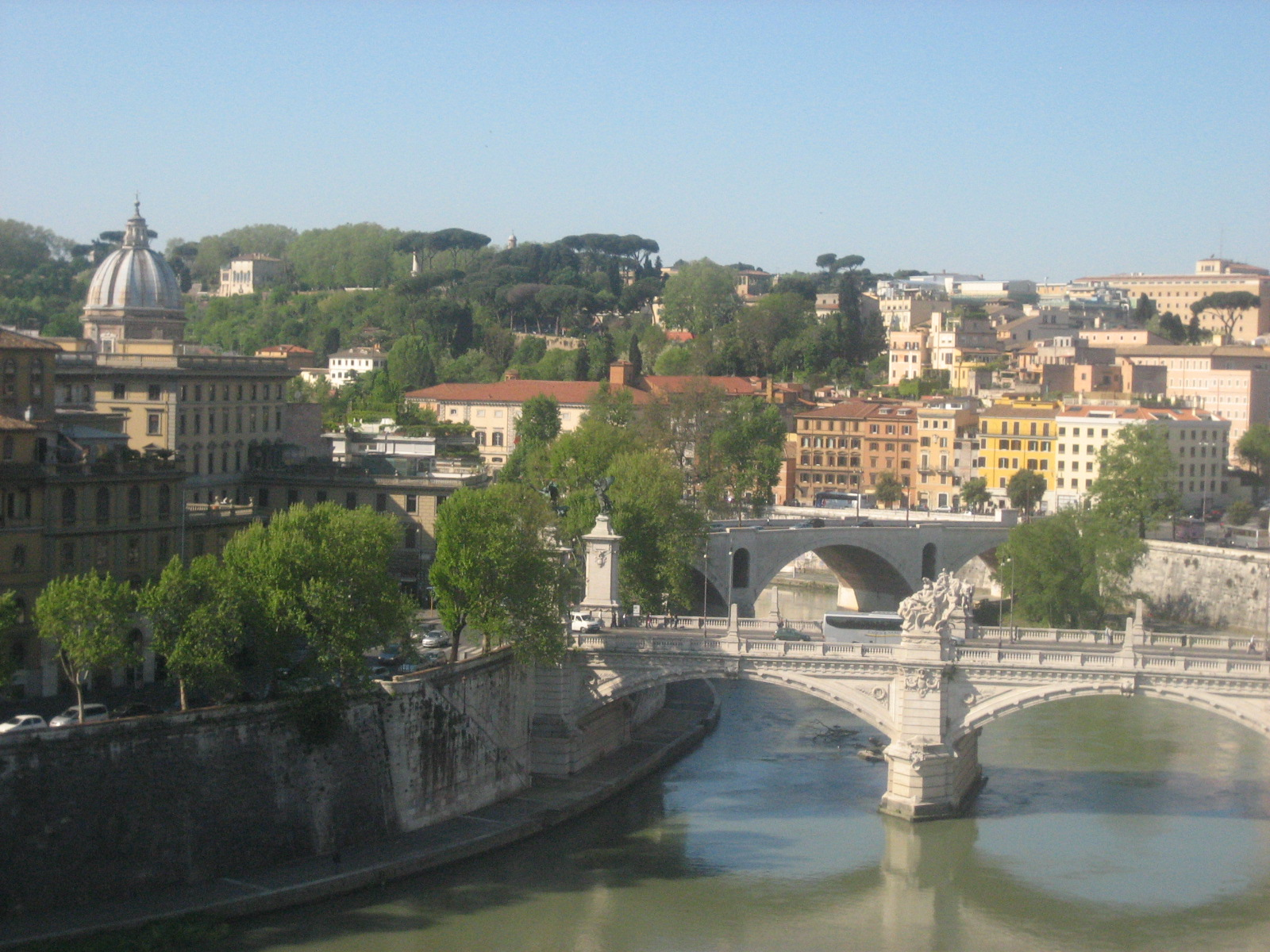 Viasta de Roma desde el Castillo de Sant Angelo